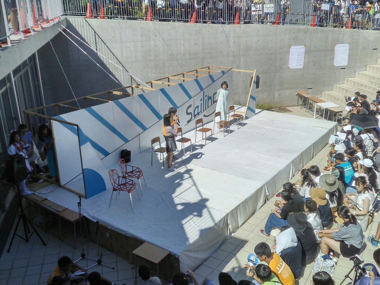 東大寺学園文化祭、Mr.美少女コンテスト。